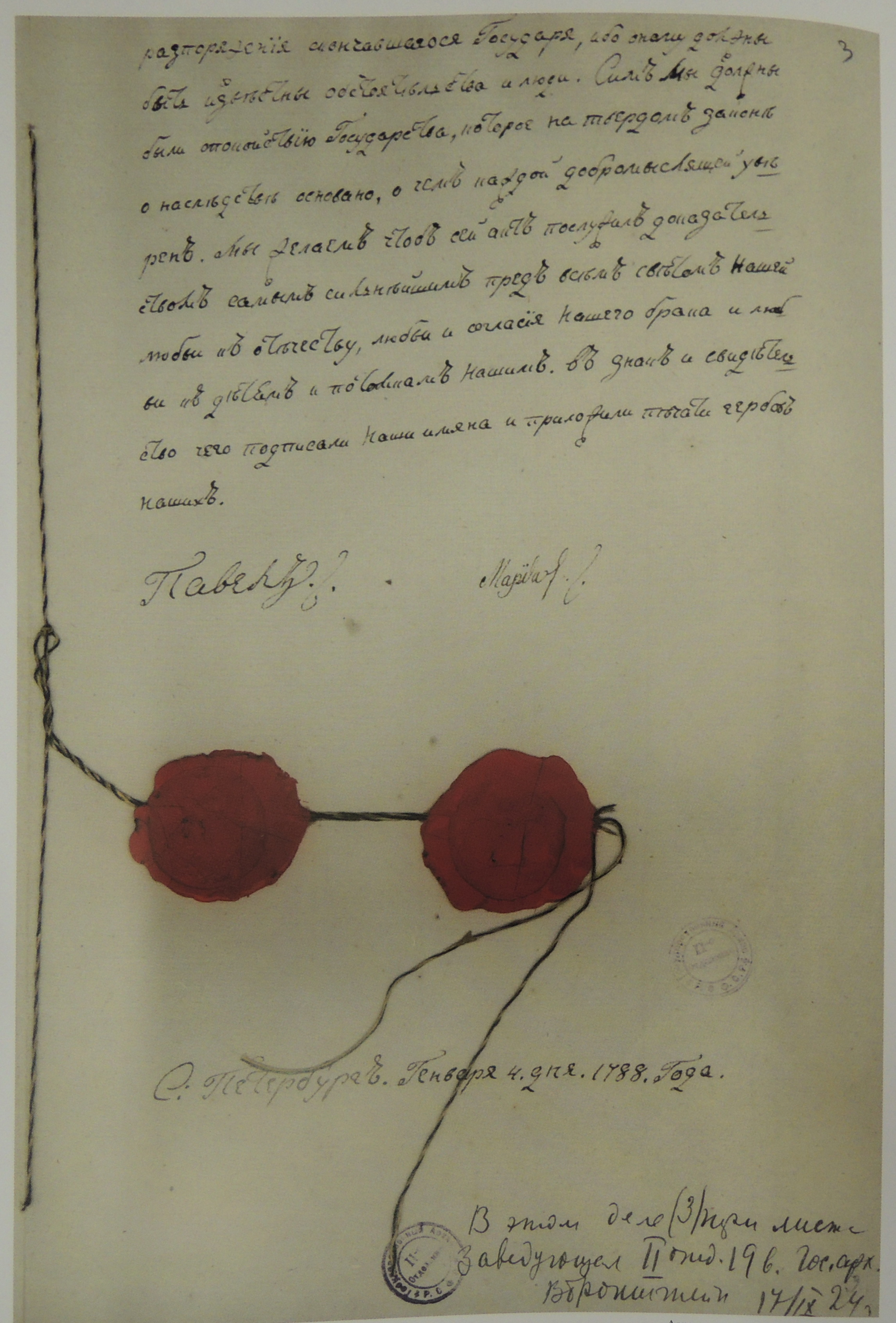 Акт о перстолонаследии. 4 января 1788 года. Подлинник. Рукопись, автограф вел. кн. Павла Петровича, подписи Павла Петровича и Марии Федоровичи. Государственный архив РФ. Выставка "Венчания на царство и коронации в Московском Кремле" (2013)